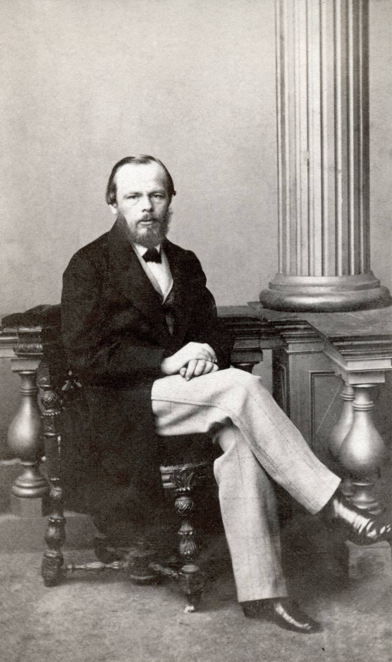 Ф.М. Достоевский. 1861. Фотография М.Б. Тулинова